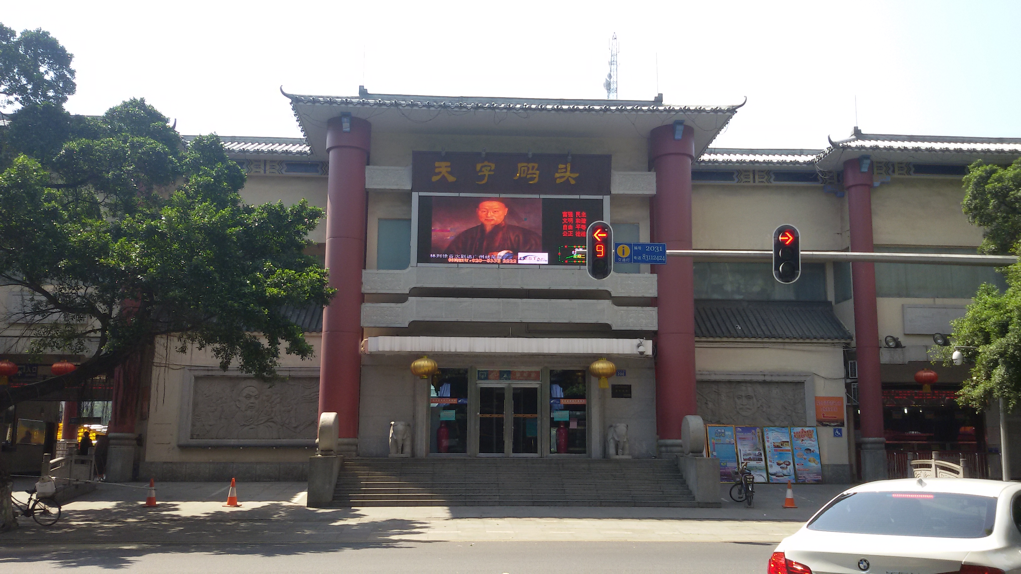 粵語: 天字碼頭個樣